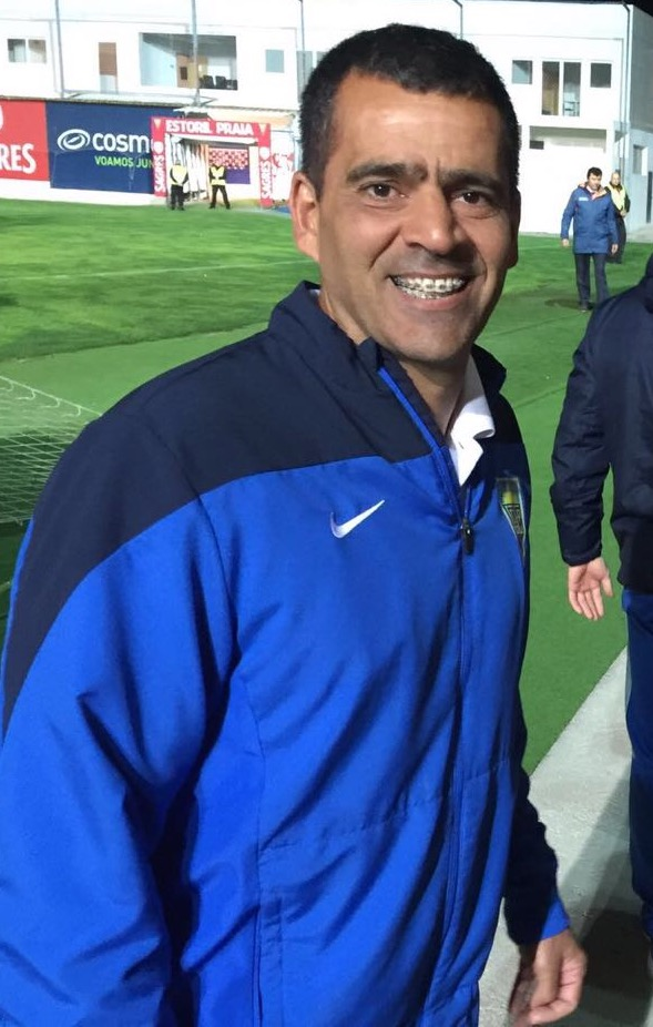 Arquivo pessoal